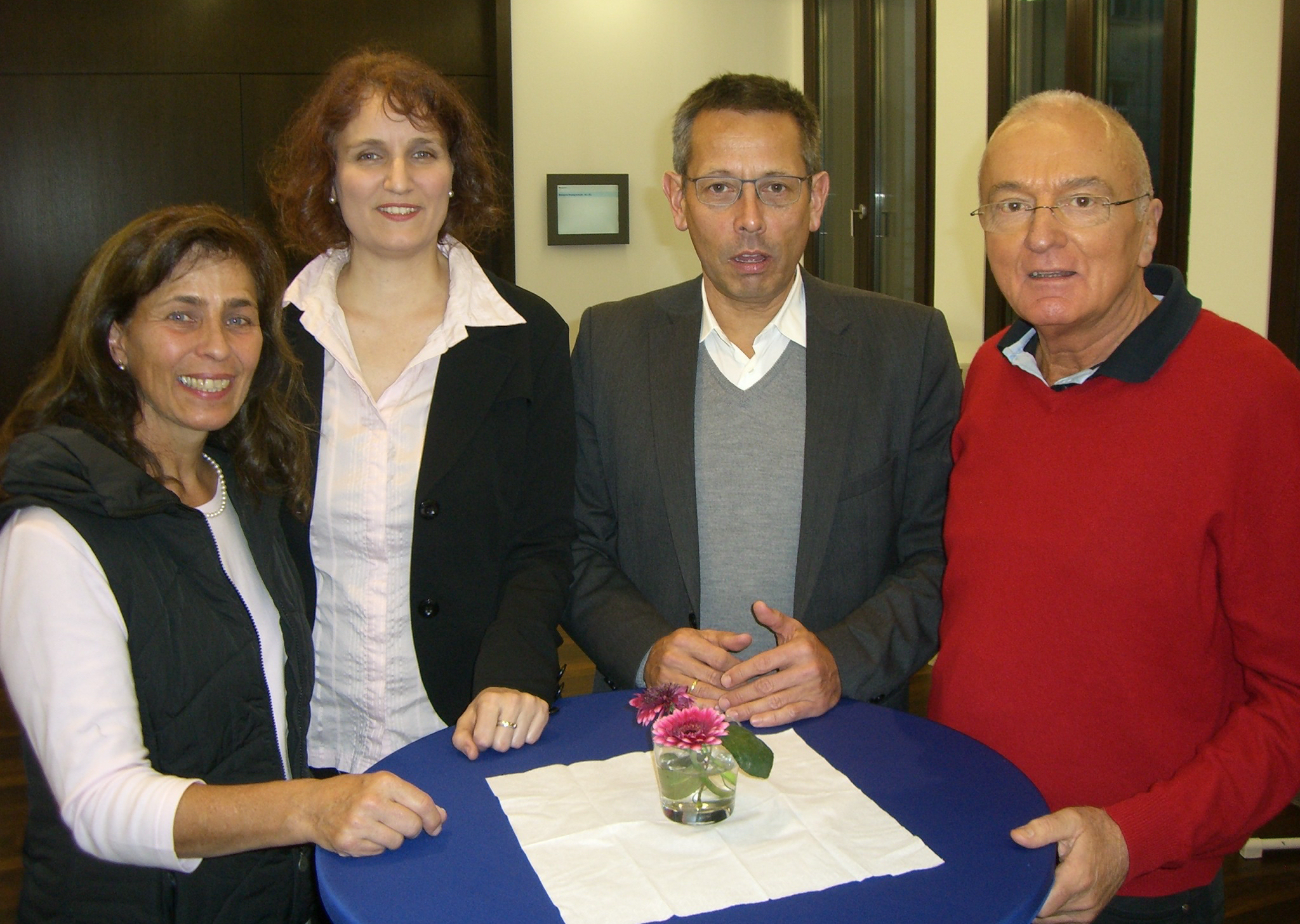 Marcella Becker (netzwerkB), Katharina Mikada (netzwerkB), Johannes-Wilhelm Rörig (Unabhängiger Bundesbeauftragter für Fragen des sexuellen Kindesmissbrauchs), Norbert Denef (netzwerkB) beim Jour Fixe in Berlin am 9. September 2012.